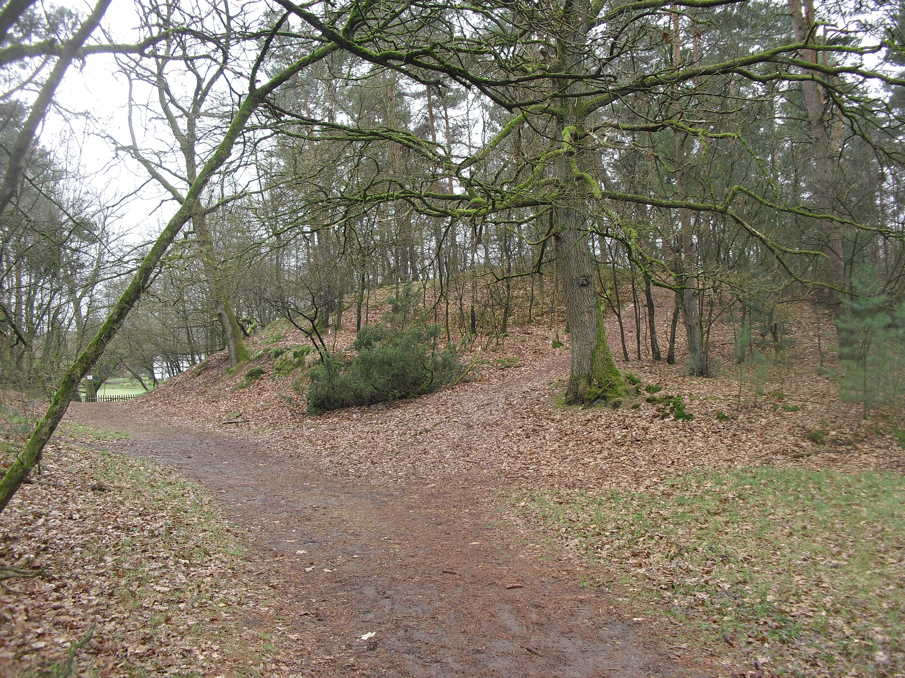 Düne in der Moosheide (Krollbachdünen)